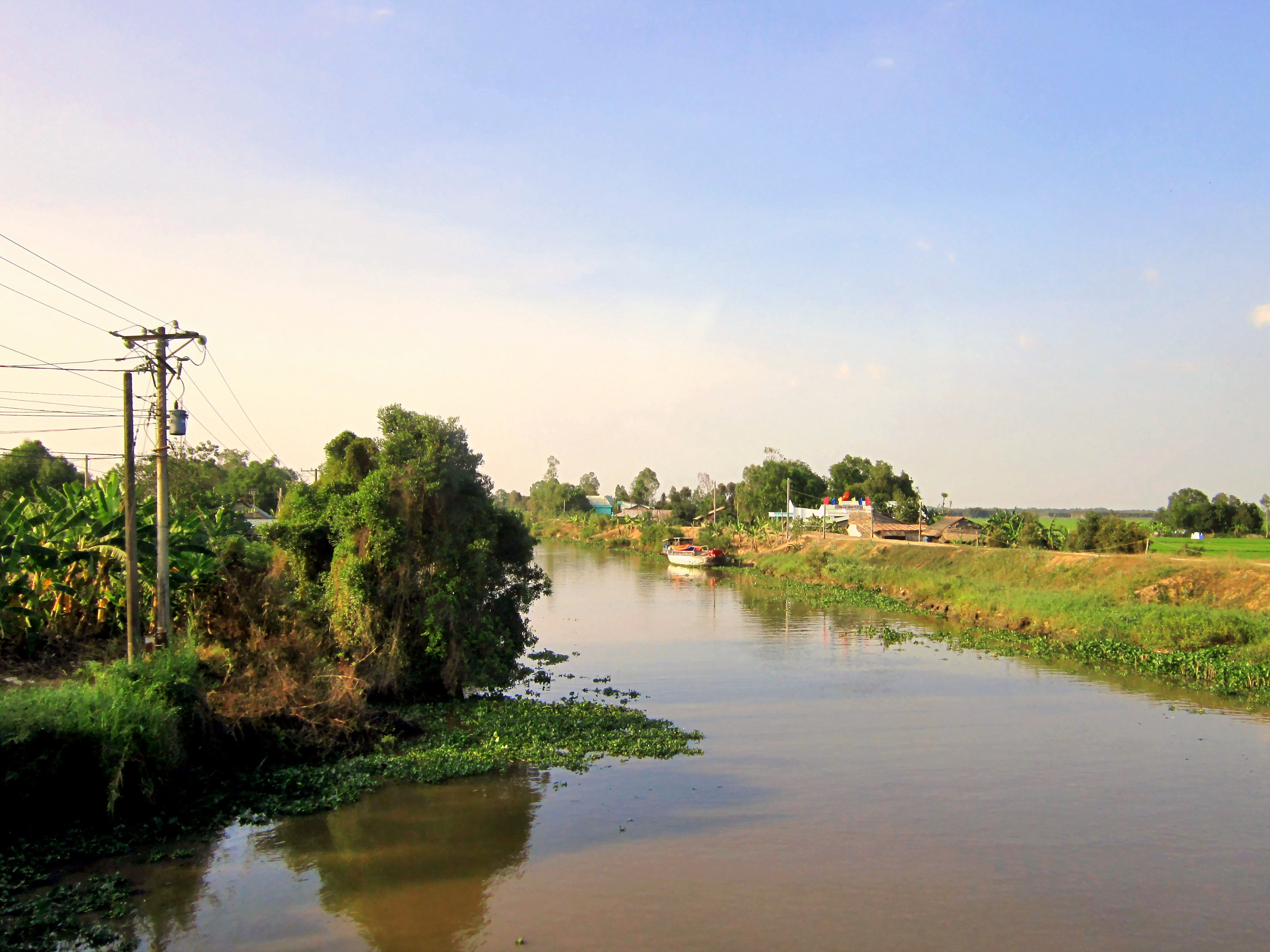 Một cảnh ở nông thôn xã Thạnh Tân, thuộc huyện Tân Phước, tỉnh Tiền Giang, Việt Nam.